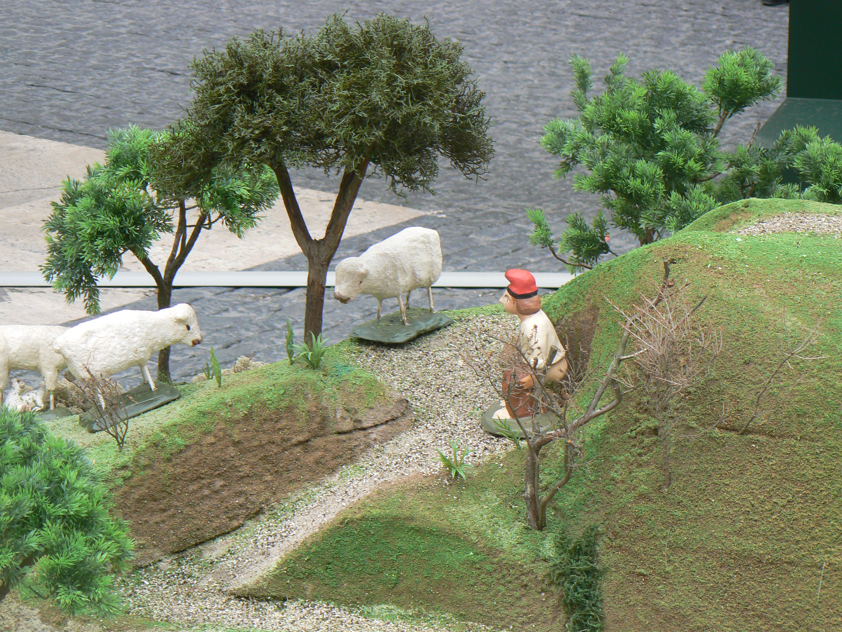 Figura tradicional del caganer amagat al pessebre de l'ajuntament de Barcelona a la plaça Sant Jaume, el nadal de 2010-2011.